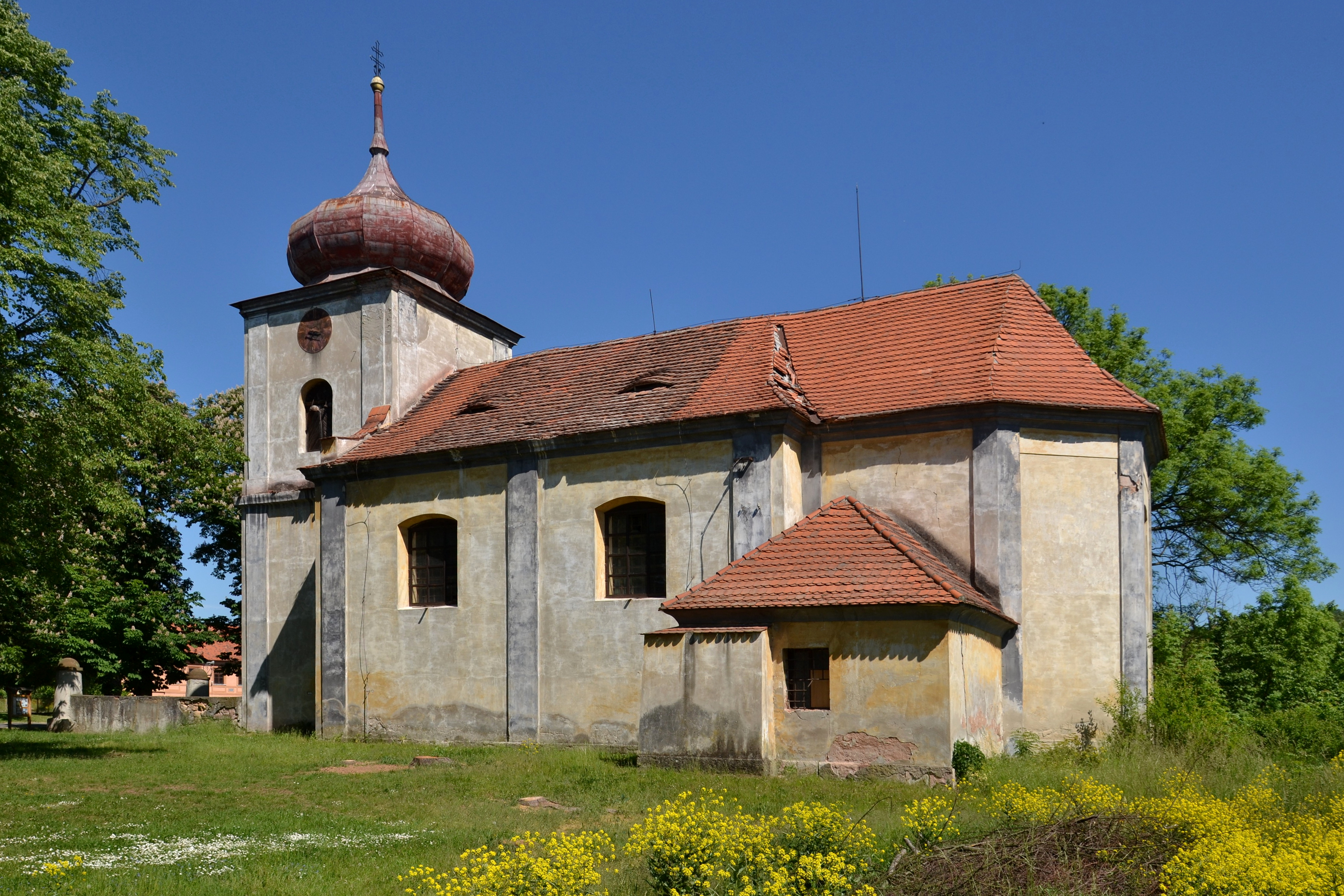 Kostel svatého Jiří, Soběchleby, Soběchleby (Blšany).